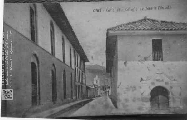 Antigua sede del colegio, alli funcionó desde su fundación en 1823(Convento e Iglesia de los Agustinos).Santiago de Cali, C. 1940. El Archivo del Patrimonio Fotográfico y Fílmico del Valle del Cauca es responsabilidad de la Biblioteca Departamental del Valle Jorge Garcés Borrero, por convenio de cooperación suscrito con la Secretaria del Cultura Departamental, con el fin de aunar esfuerzos para su conservación, preservación y divulgación del Archivo entre la comunidad Vallecaucana, especialmente entre los estudiantes e investigadores que visitan la Biblioteca, propiciando el su uso y consulta permanente. La universidad Icesi es un colaborador en el proceso de difusión, facilitando la tecnología que permite la consulta de las imágenes. Citación 1: (1940). Antigua sede del colegio, alli funcionó desde su fundación en 1823(Convento e Iglesia de los Agustinos) & 202453. SANTIAGO DE CALI: Biblioteca Departamental Jorge Garces Borrero. Citación 2: Fondo Archivo del Patrimonio Fotográfico y Fílmico del Valle del Cauca